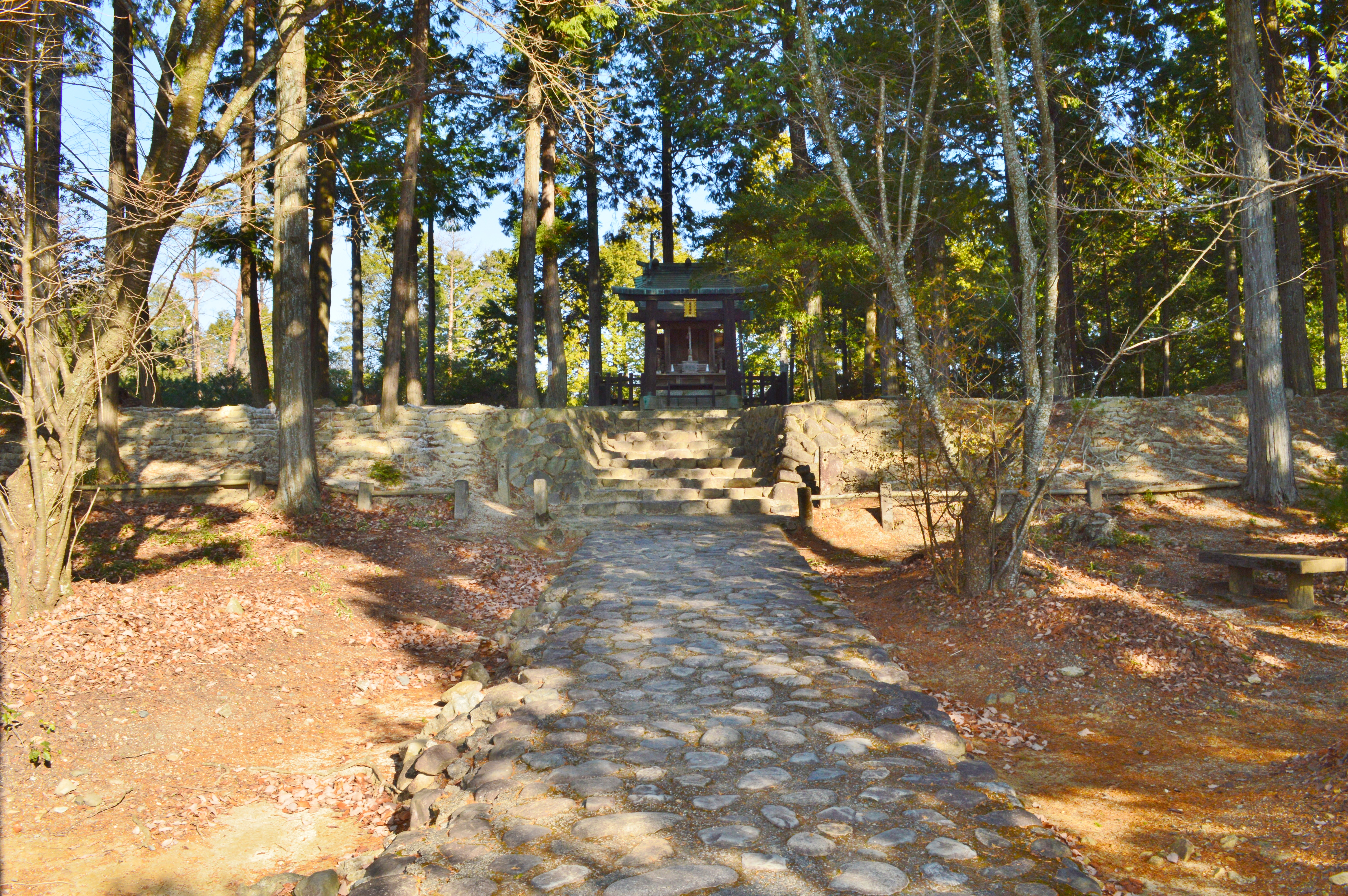 紫香楽宮跡内裏野地区 金堂基壇